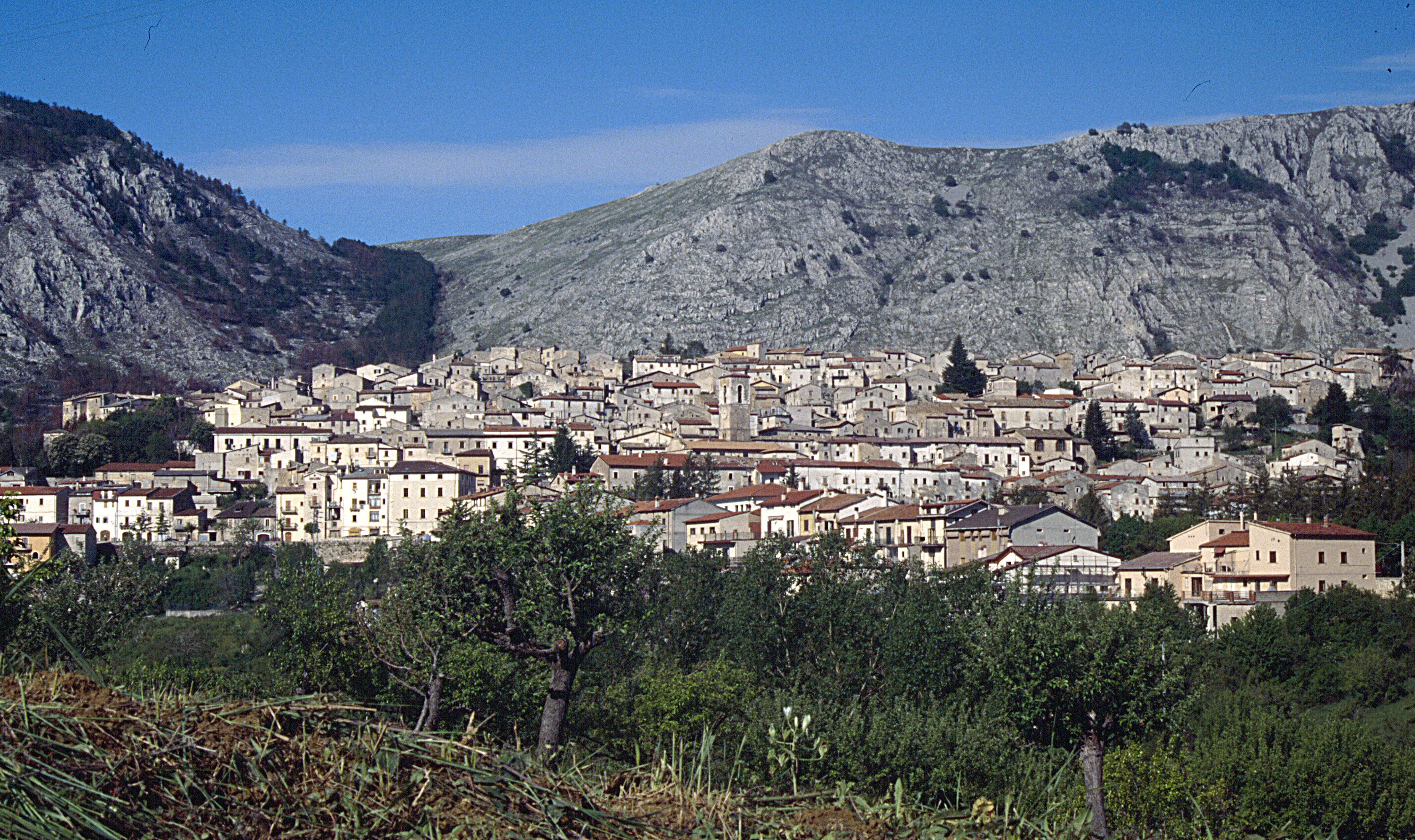 Ortona dei Marsi